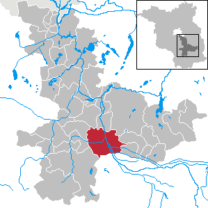 Lübben (Spreewald) in Brandenburg (Country) - District Dahme-Spreewald